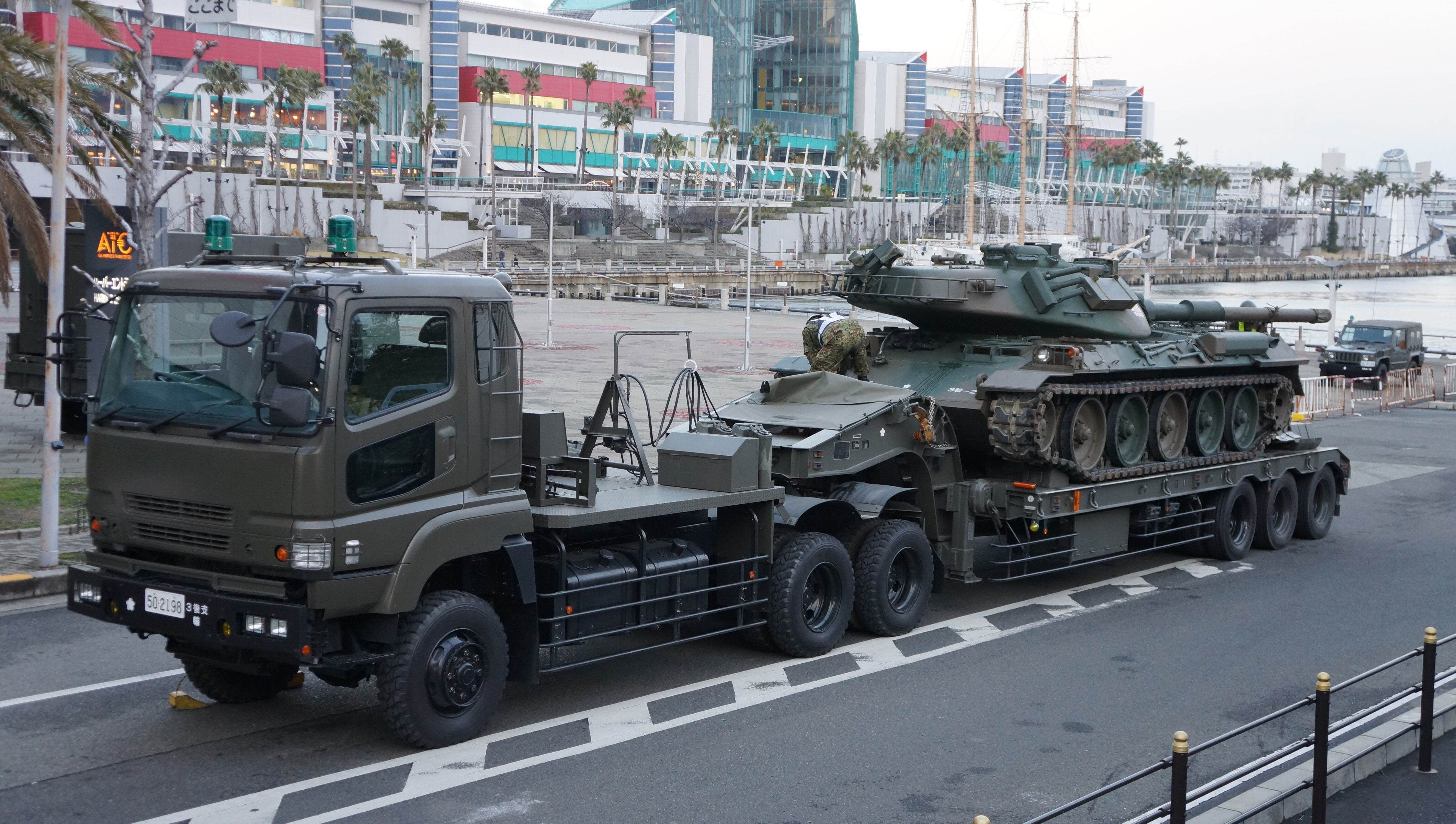 陸上自衛隊 74式戦車を積載した73式特大型セミトレーラ。 13年3月10日 大阪ATCにて。